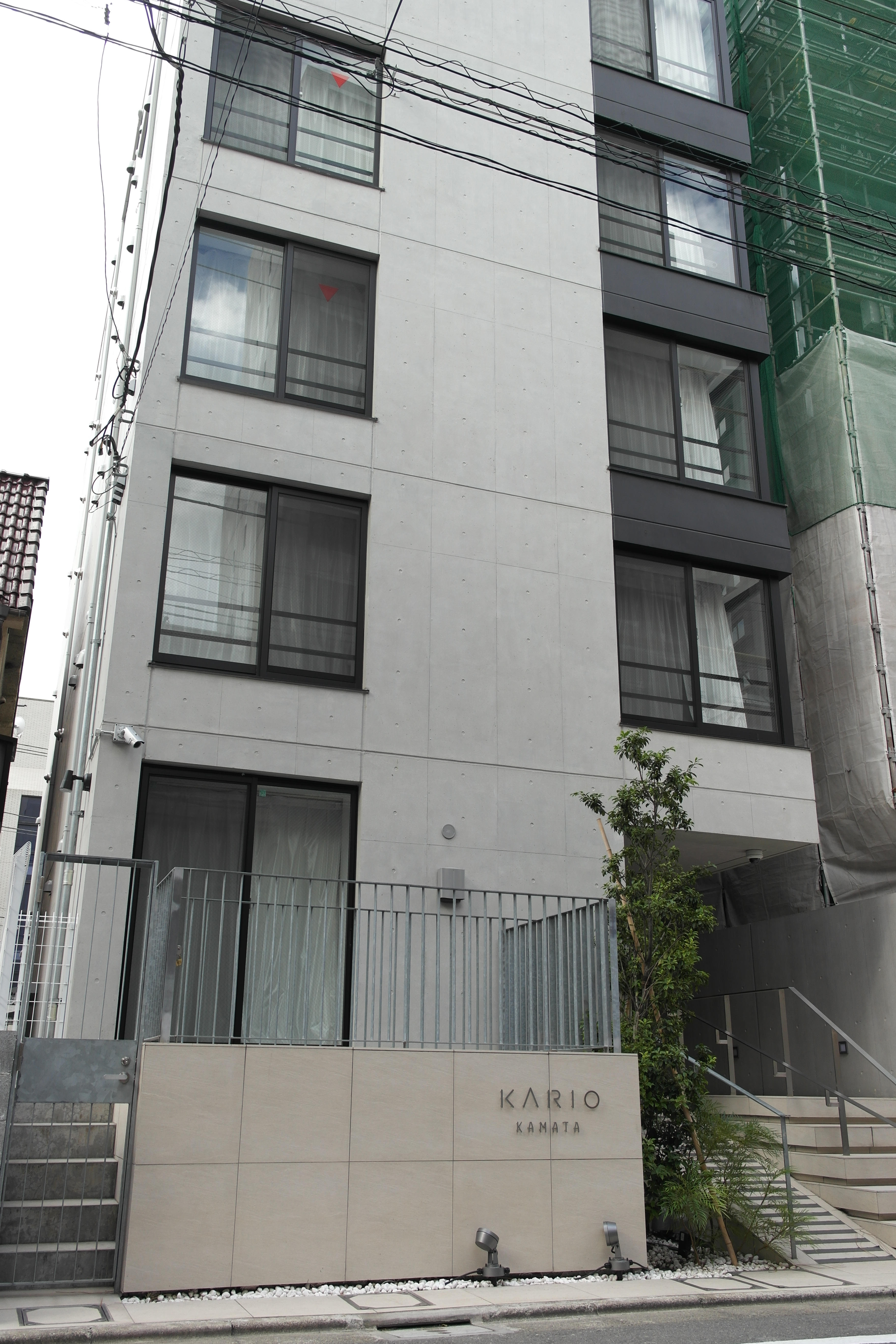 京王電鉄が参入した新築マンション一棟丸ごとの民泊「カリオ蒲田」